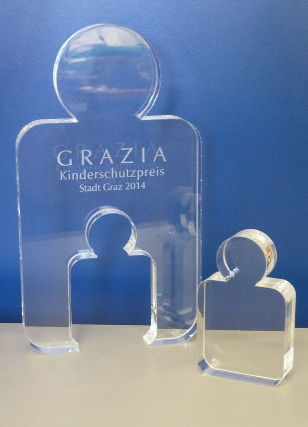 Grazia 2014 - Preis Akademisches Gymnasium Graz 1. Platz